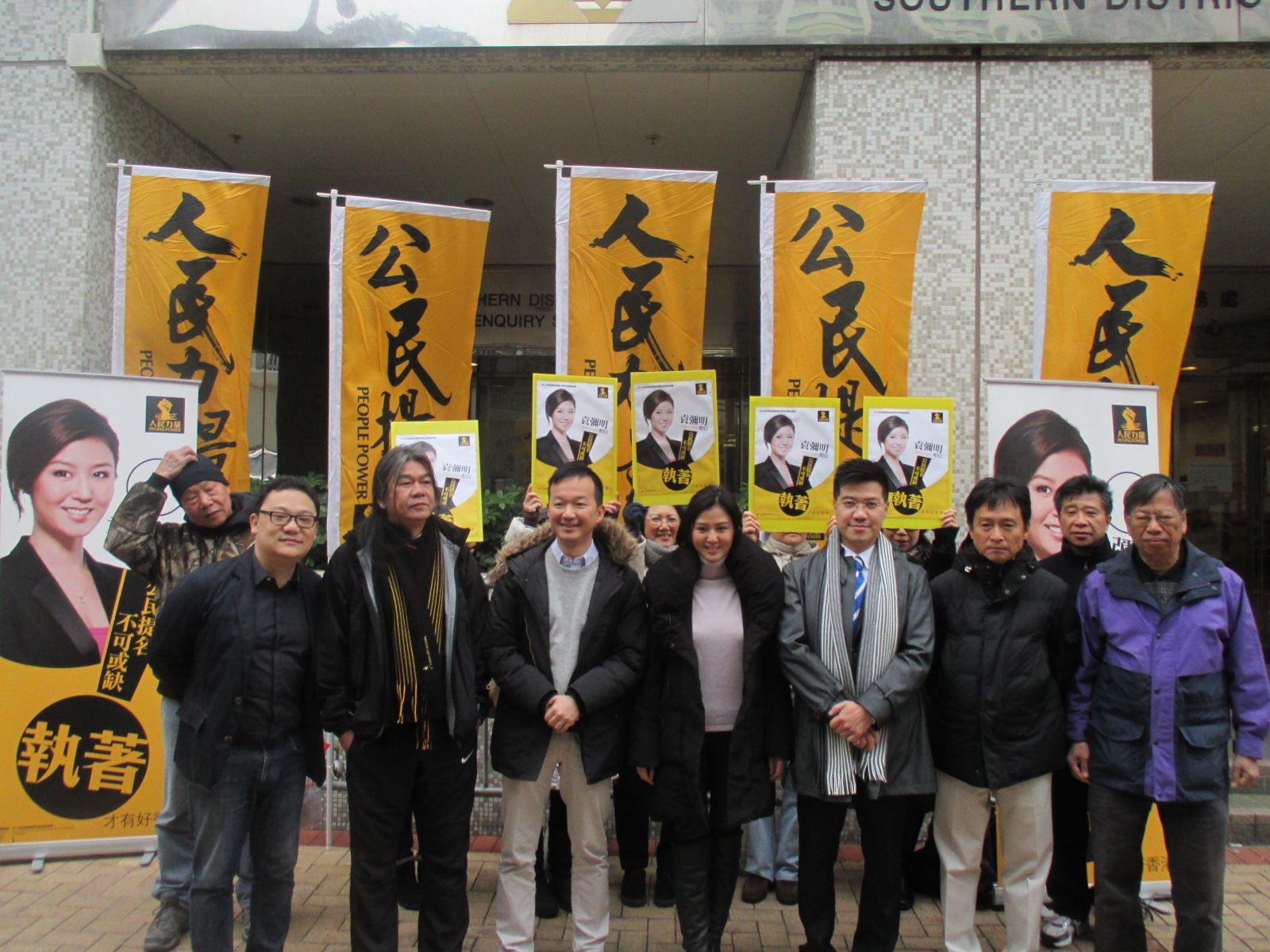 人民力量「劉嗡」劉嘉鴻、社民連「長毛」梁國雄、人民力量「慢必」陳志全、人民力量主席袁彌明、新民主同盟范國威、蔡錦源導演、前綫主席甄桑港，聯合支持袁彌明出選海怡西。